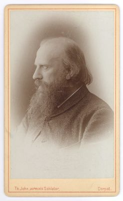 Pavel Aleksandrovitš Viskovatov